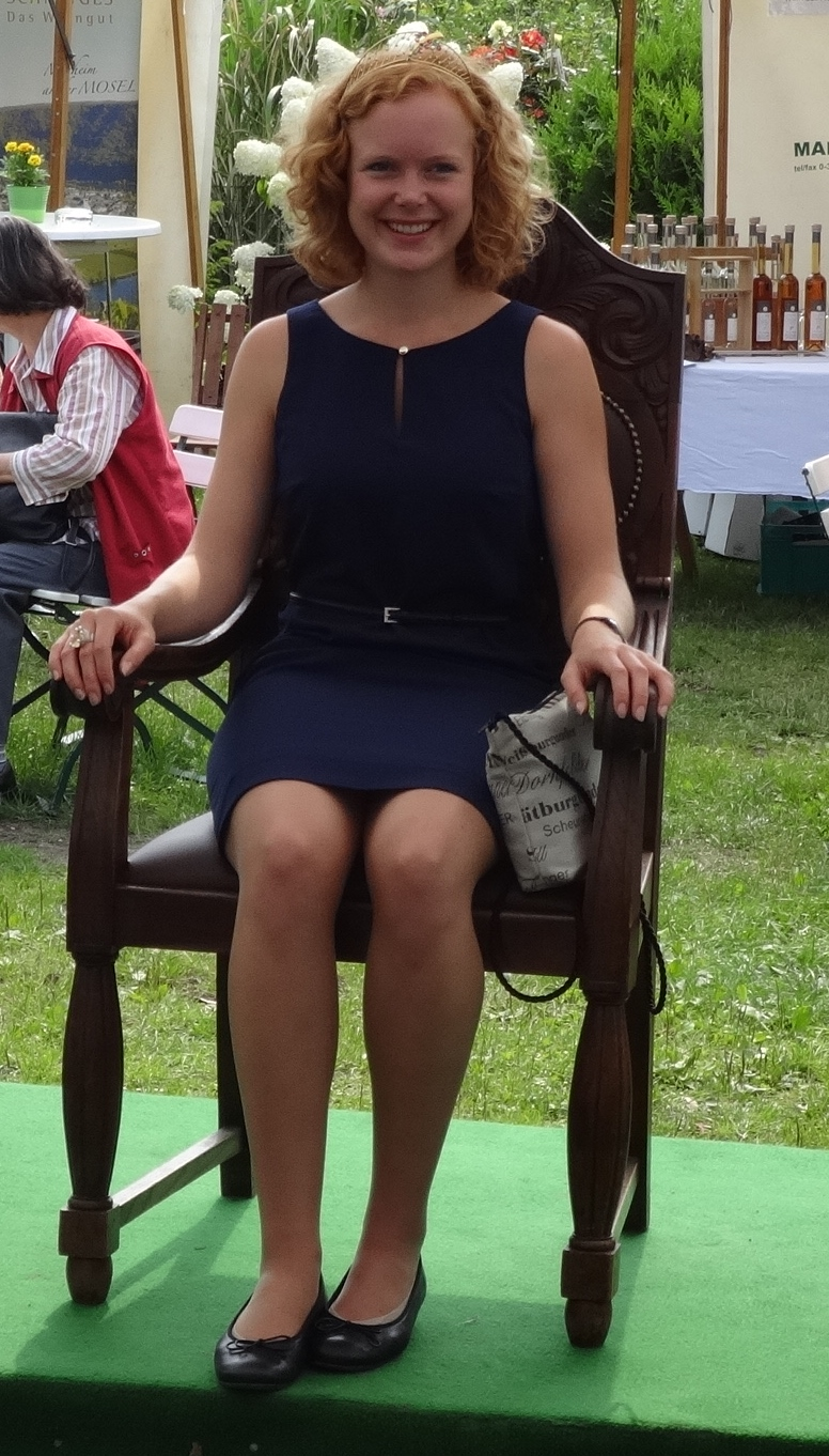 Nadine Poss aus Windesheim, 65. Deutsche Weinkönigin für das Jahr 2014 beim 1. Weinfest in der Späth´schen Baumschule in Berlin-Baumschulenweg